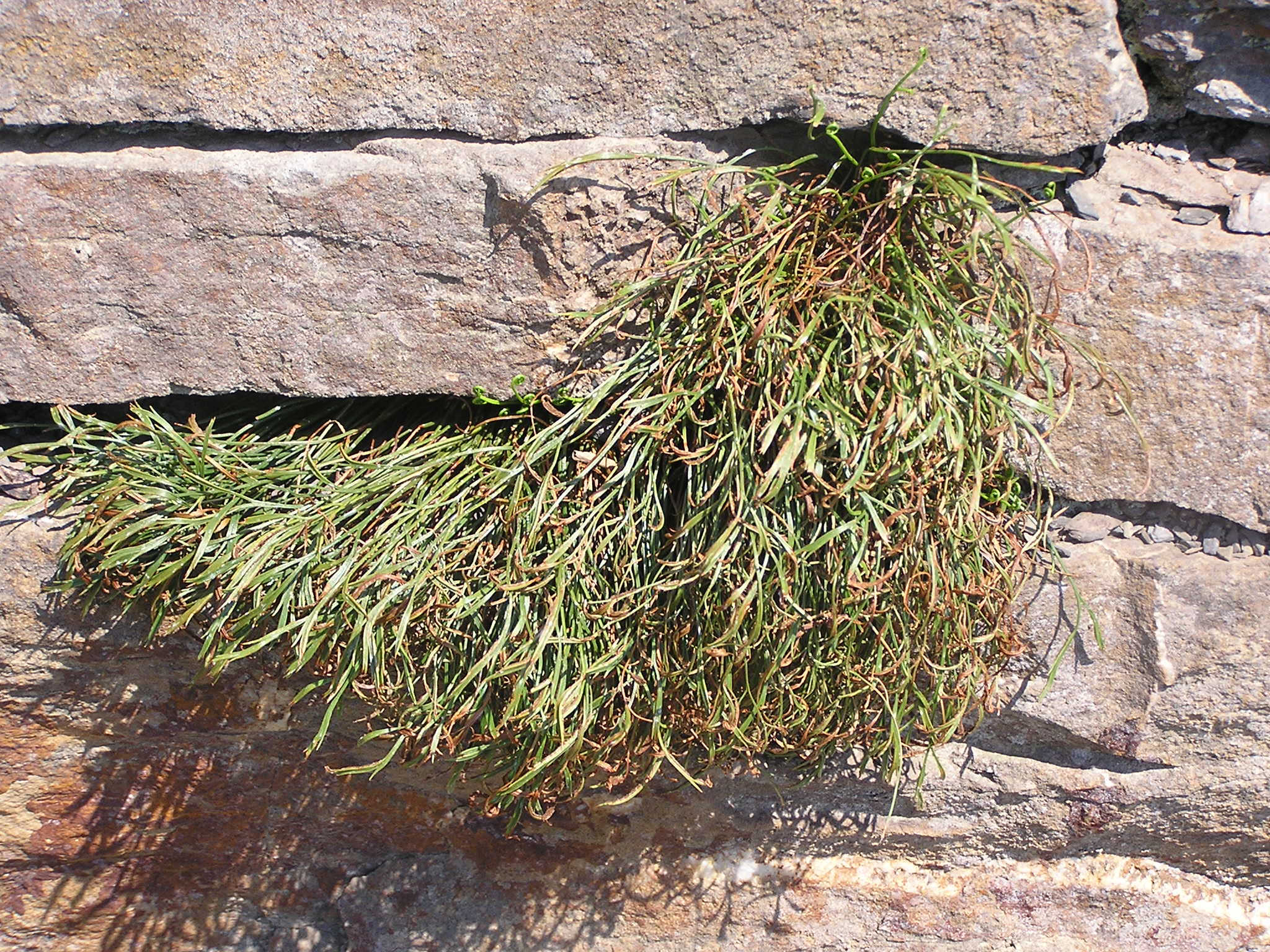 Asplenium septentrionale in einer Mauer in einem Weinberg im Ahrtal (Deutschland)